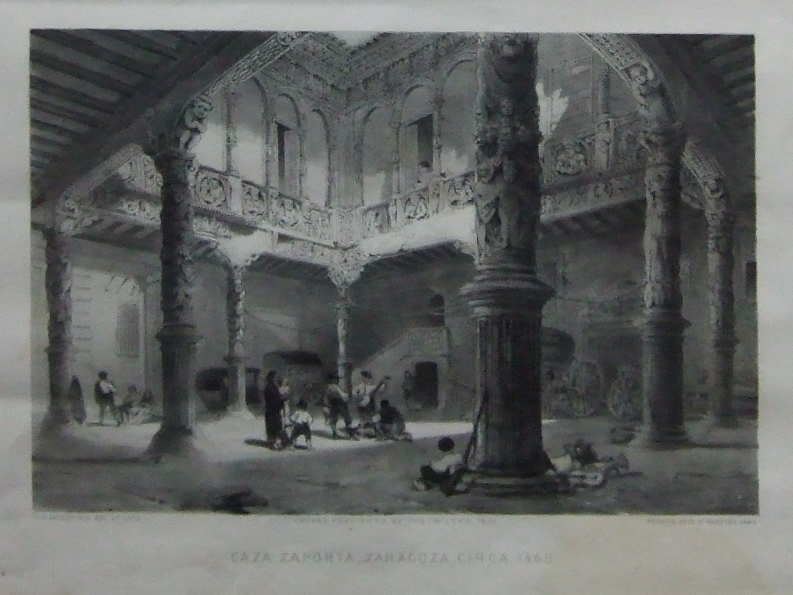 Exterior de la Lonja (1850) Autores J.B. Waring (dib.) y T.H. Macquoid (lit.) Colección Pasqual de Quinto, Zaragoza